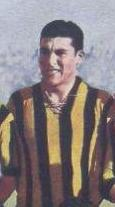 Teófilo Juárez